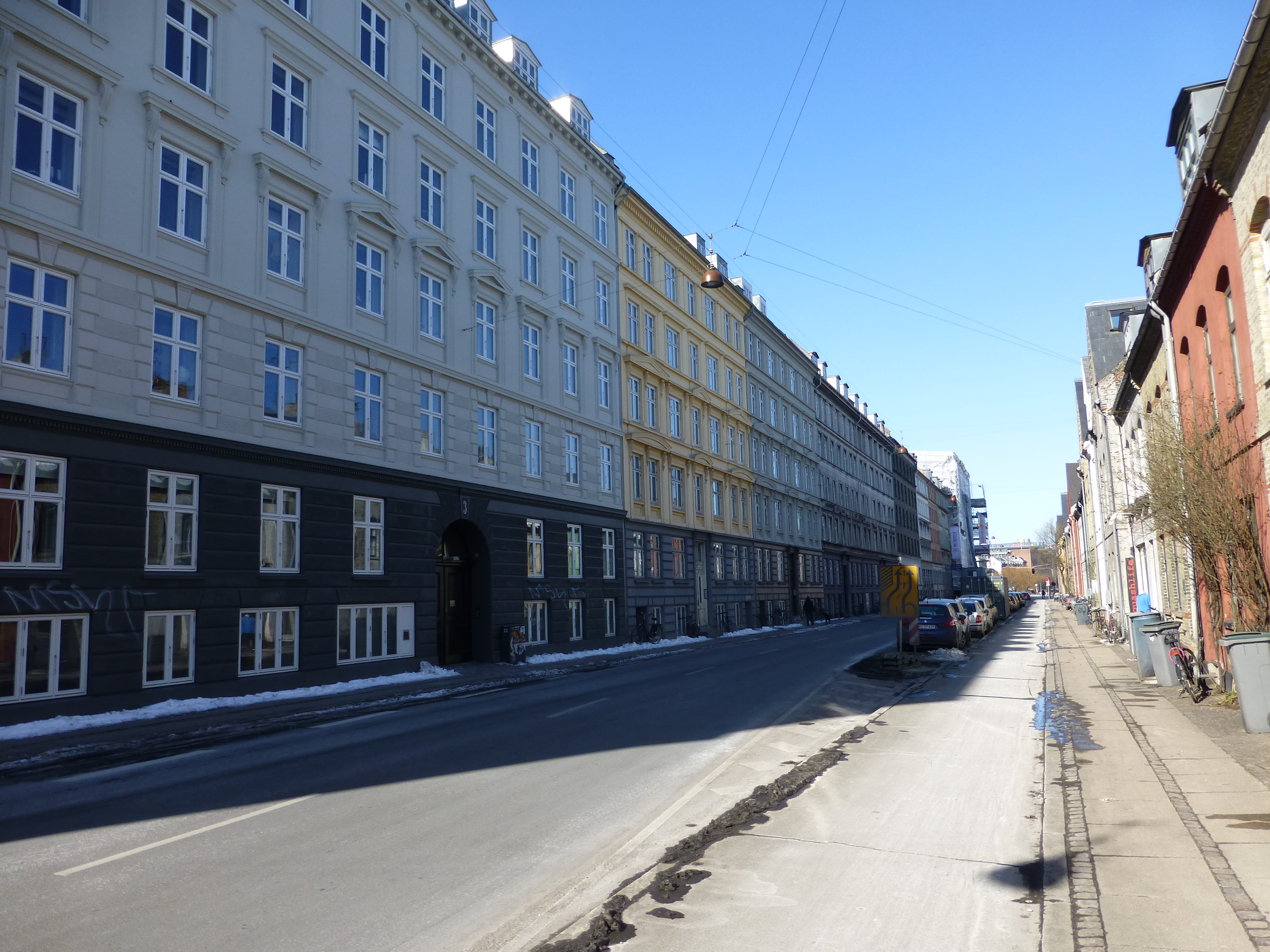 The street Webersgade in Østerbro in Copenhagen.